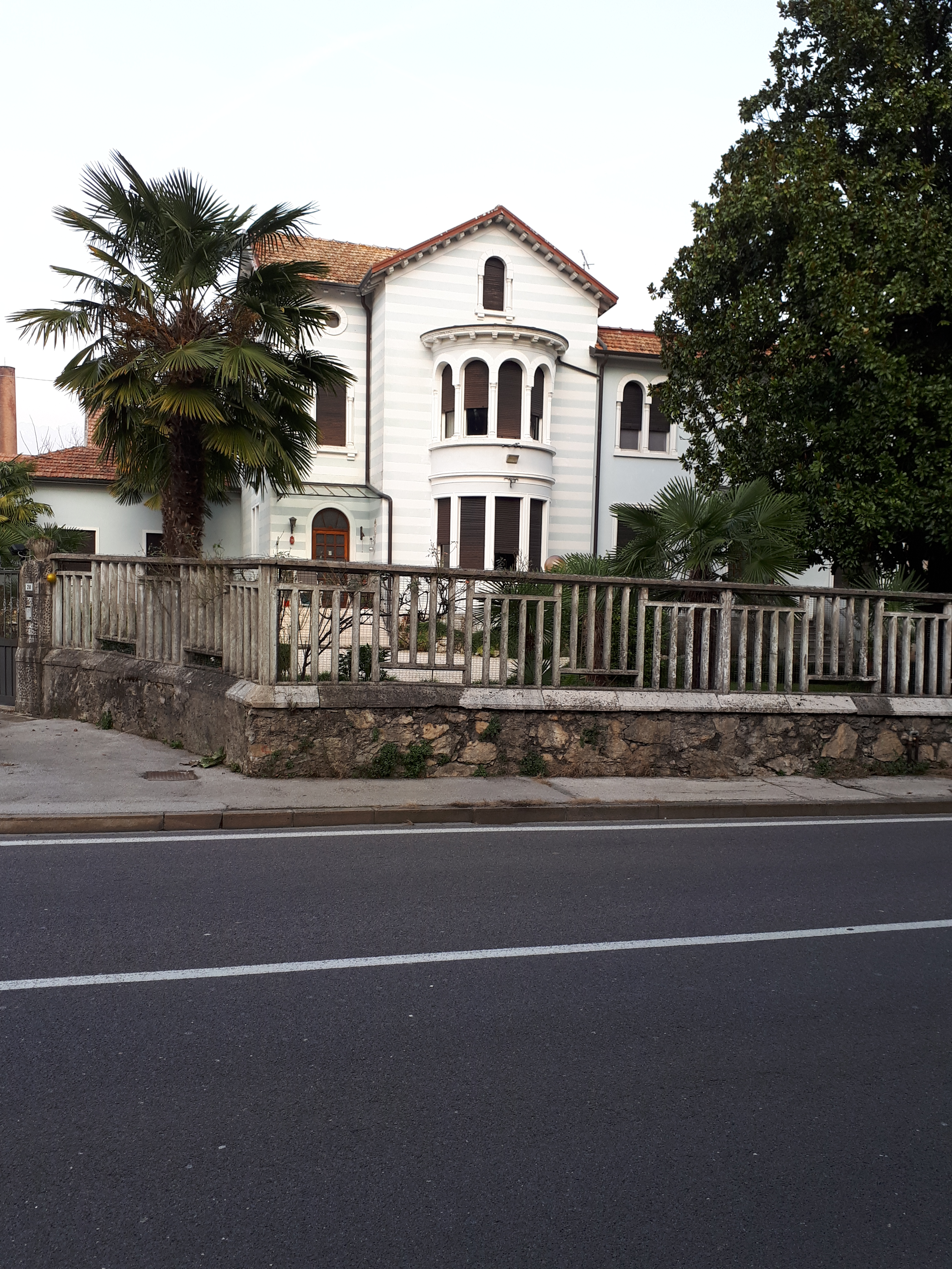 Casa del capofilanda, abitazione di prima classe